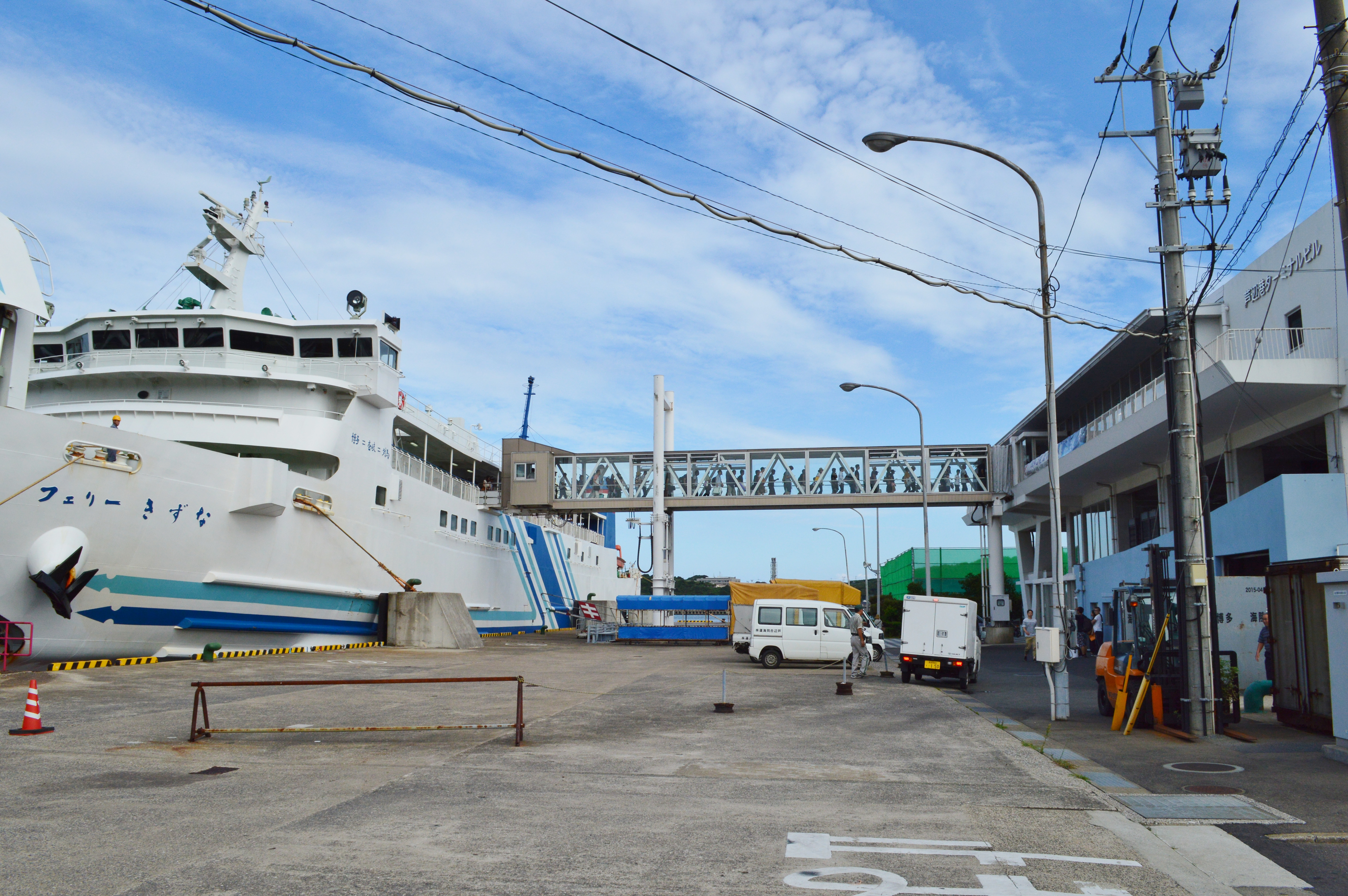 芦辺港に係留中のフェリーきずな